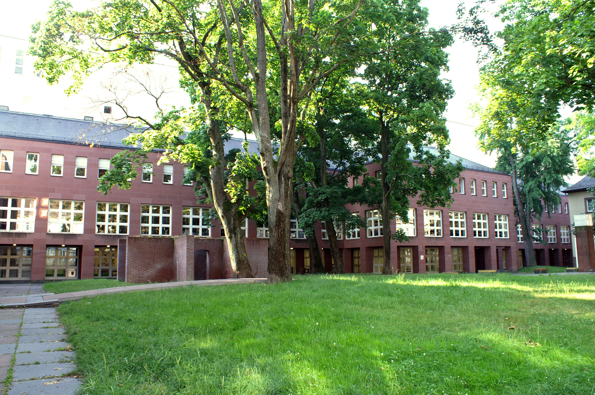 Fassade der Badischen Landesbibliothek, Innenhof